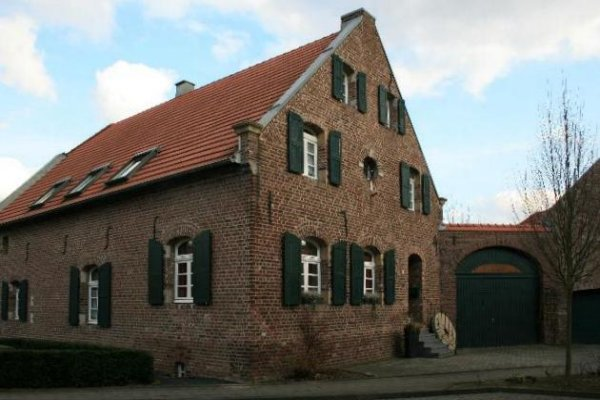 Denkmal Nr. 73 in Heinsberg-Schafhausen